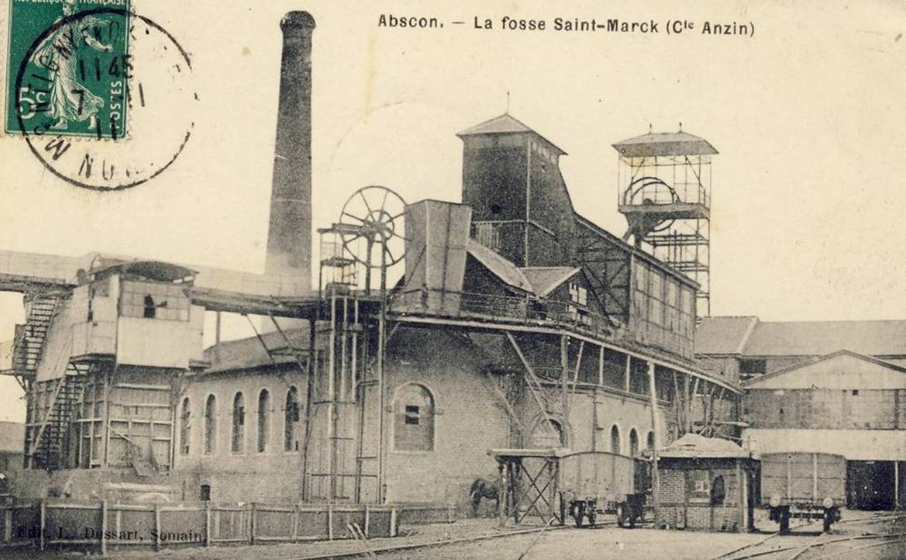 Fosse Saint Mark de la Compagnie des mines d'Anzin, Escaudain, Nord, Nord-Pas-de-Calais, France.